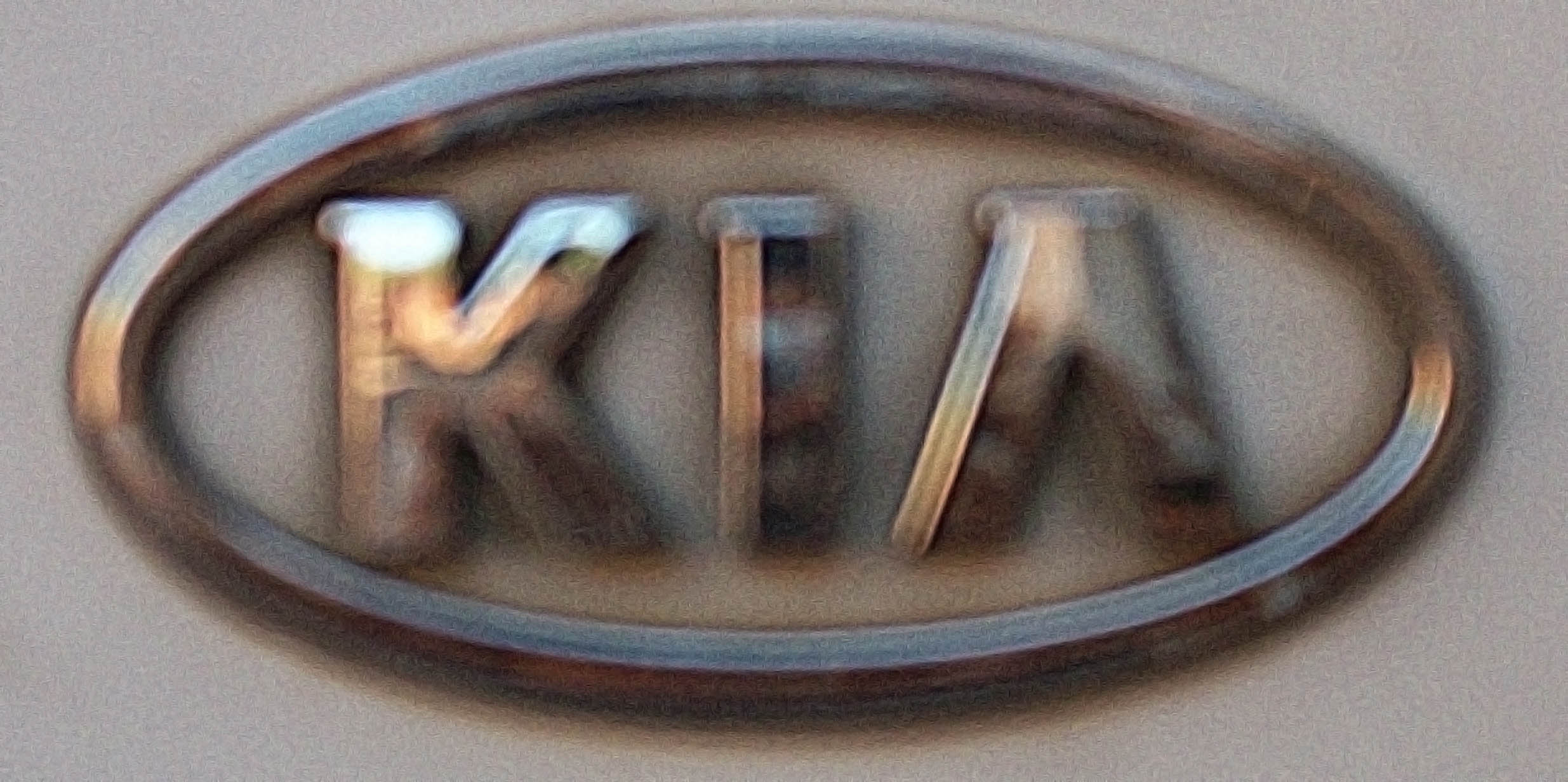 Logotipo da Kia.